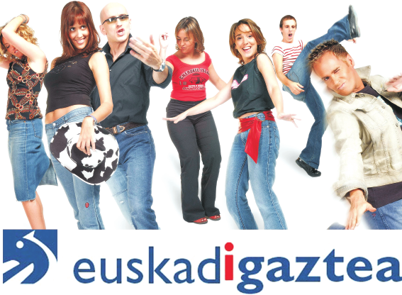 Euskal Irrati Telebista